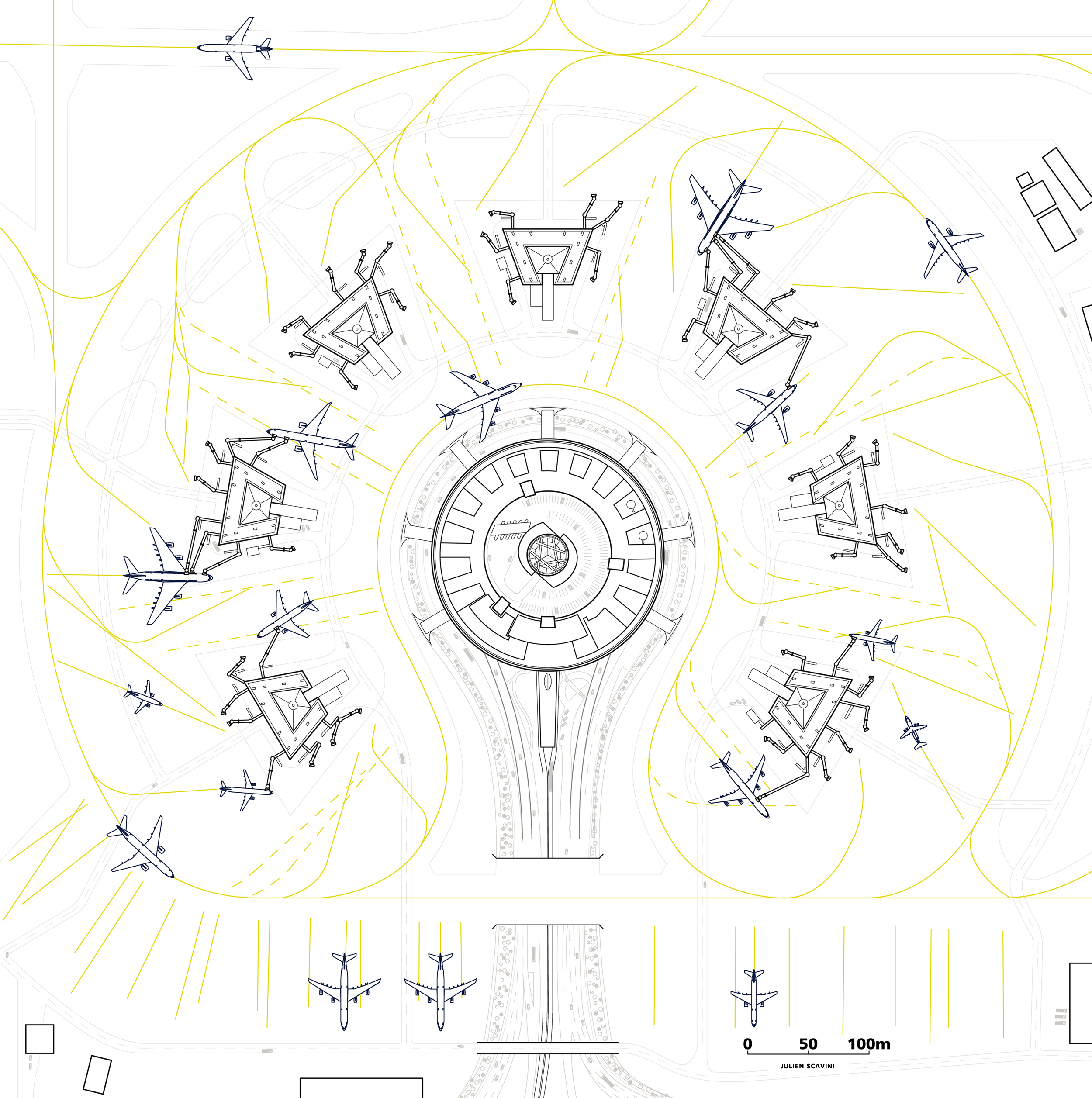 Plan de toiture (état 2017, avant démolition d'un satellite) du terminal 1 de l'aéroport de Paris Charles-de-Gaulle